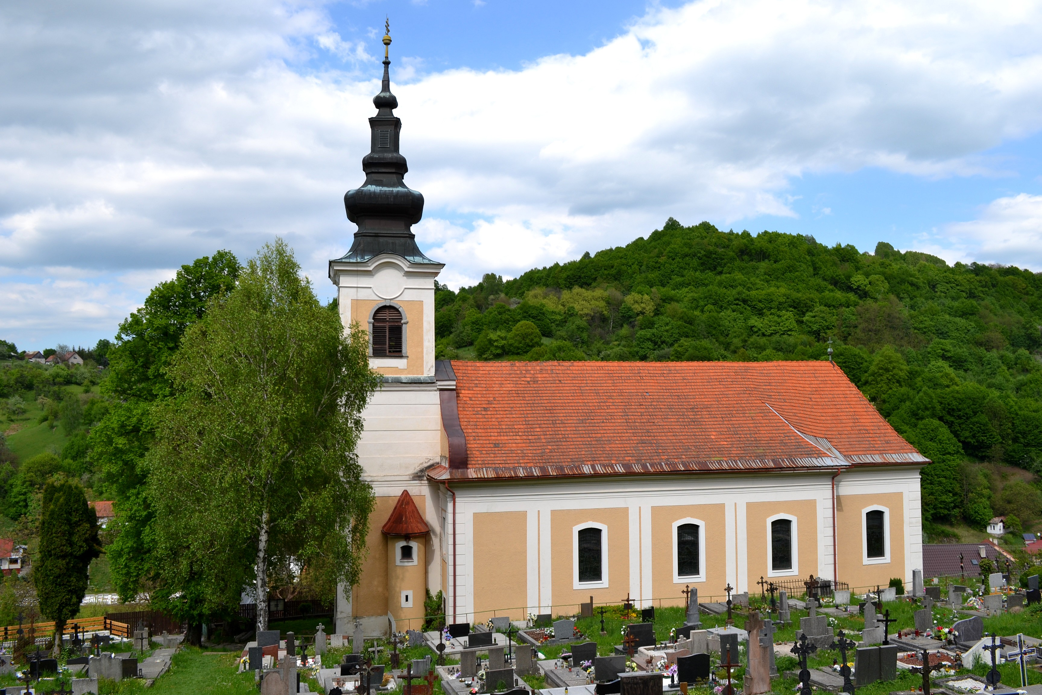 Kostol svätého Michala archanjela vo Vyhniach (okr. Žiar nad Hronom), pohľad od juhu